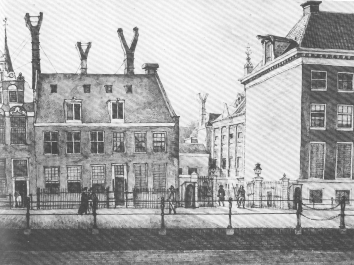 De Prinsenhof of het Zeekantoor aan de O.Z. Voorburgwal